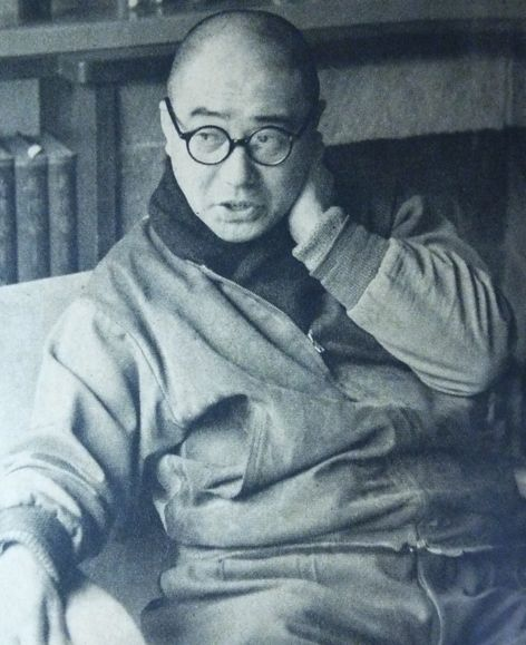 安藤鶴夫